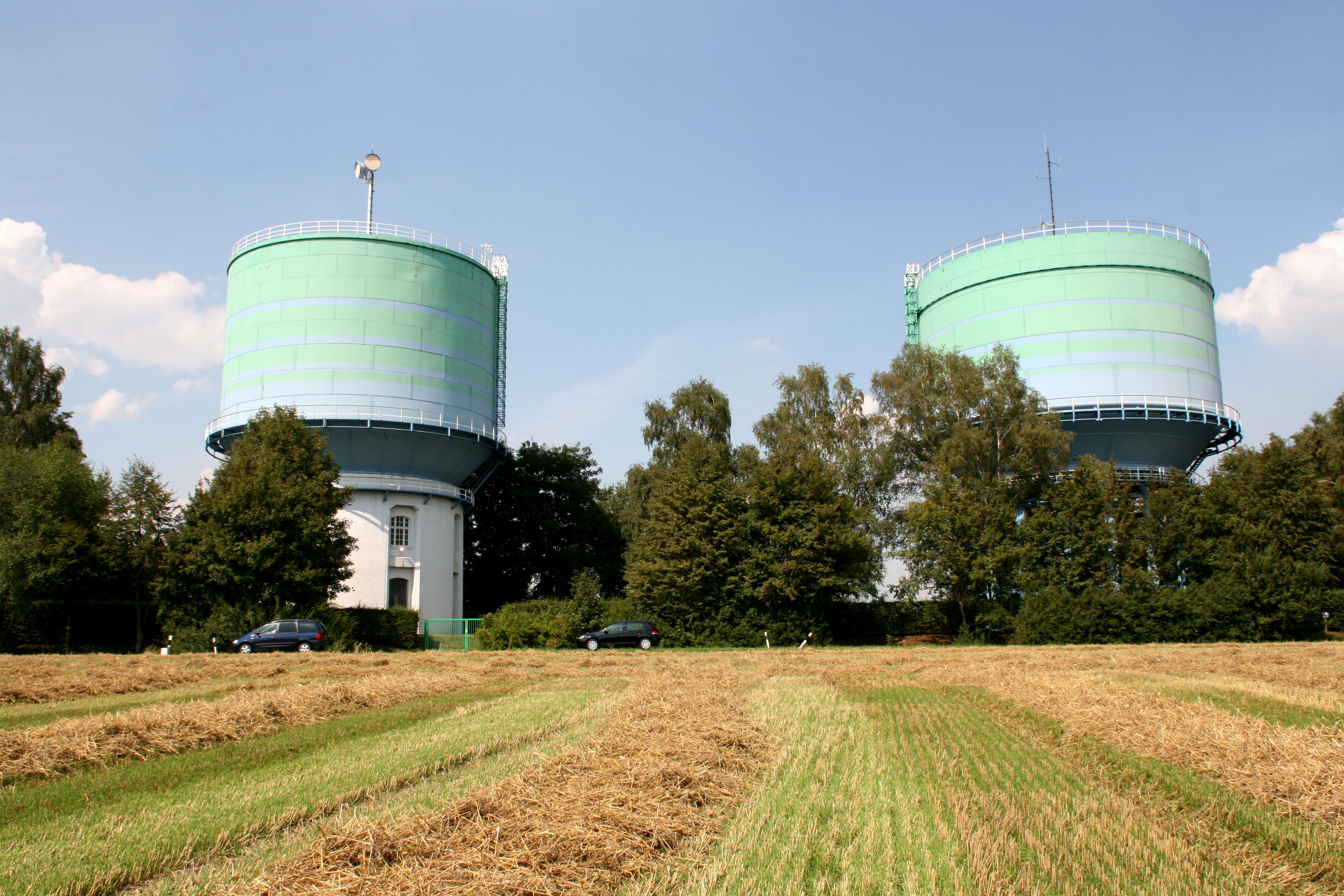 Wassertürme von Gelsenwasser, Westerholter Straße in Herten